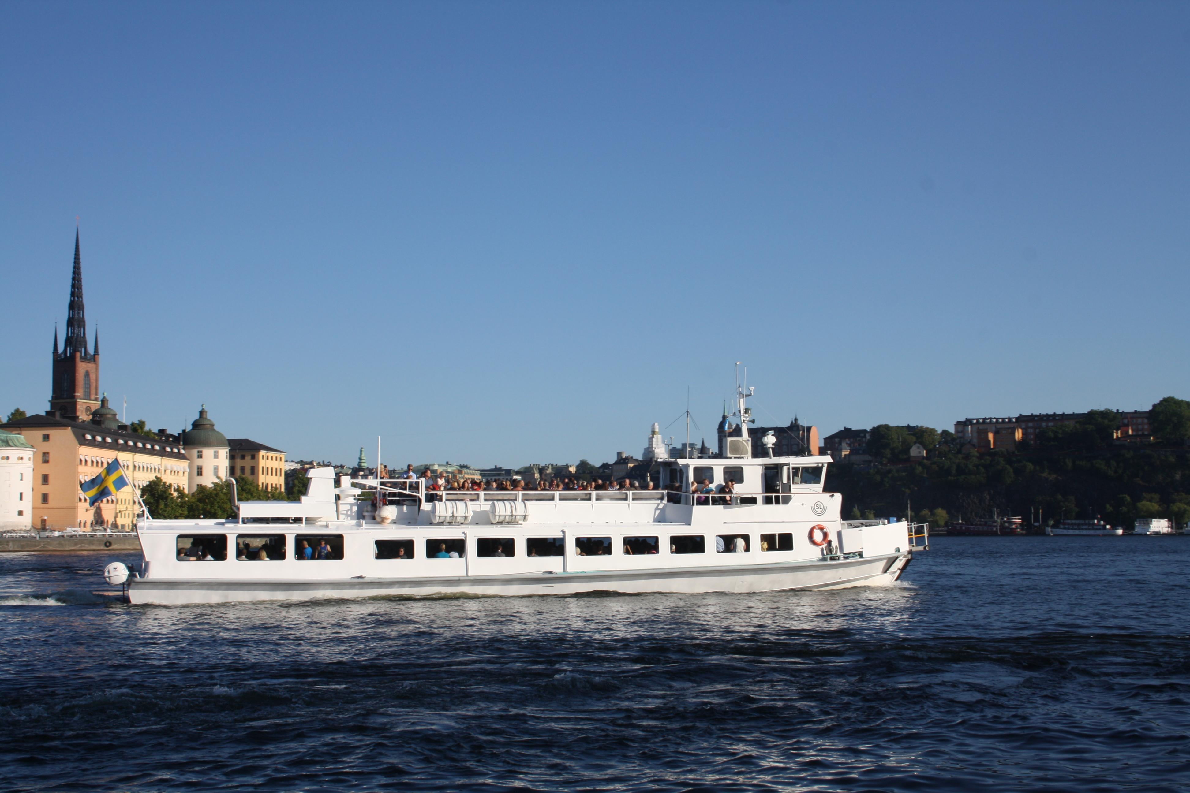 Kungshatt lämnar Klara Mälarstrand - augusti 2016